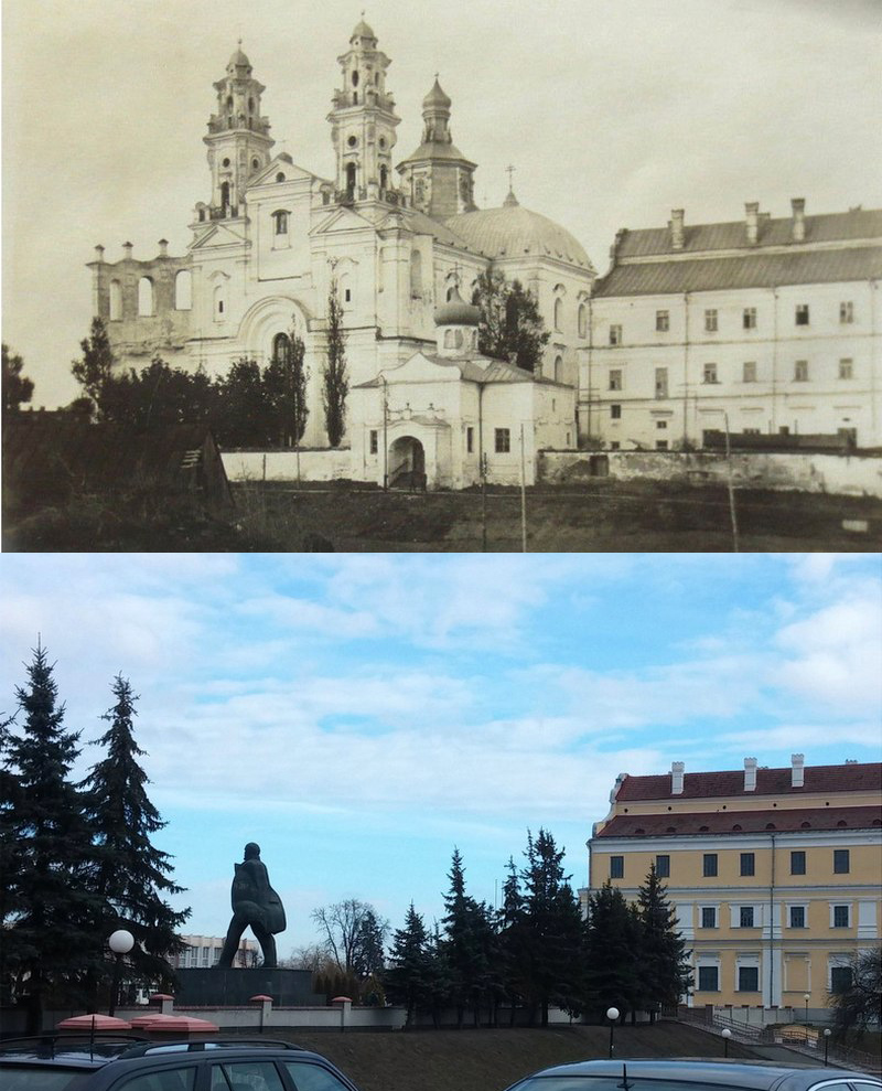 Беларуская (тарашкевіца): Касцёл Святога Станіслава ў Пінску, які быў зруйнаваны з 1953г.